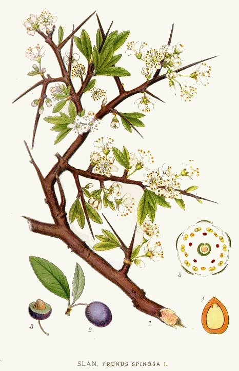 Prunus spinosa L. Original Description Slån, Prunus spinosa L.